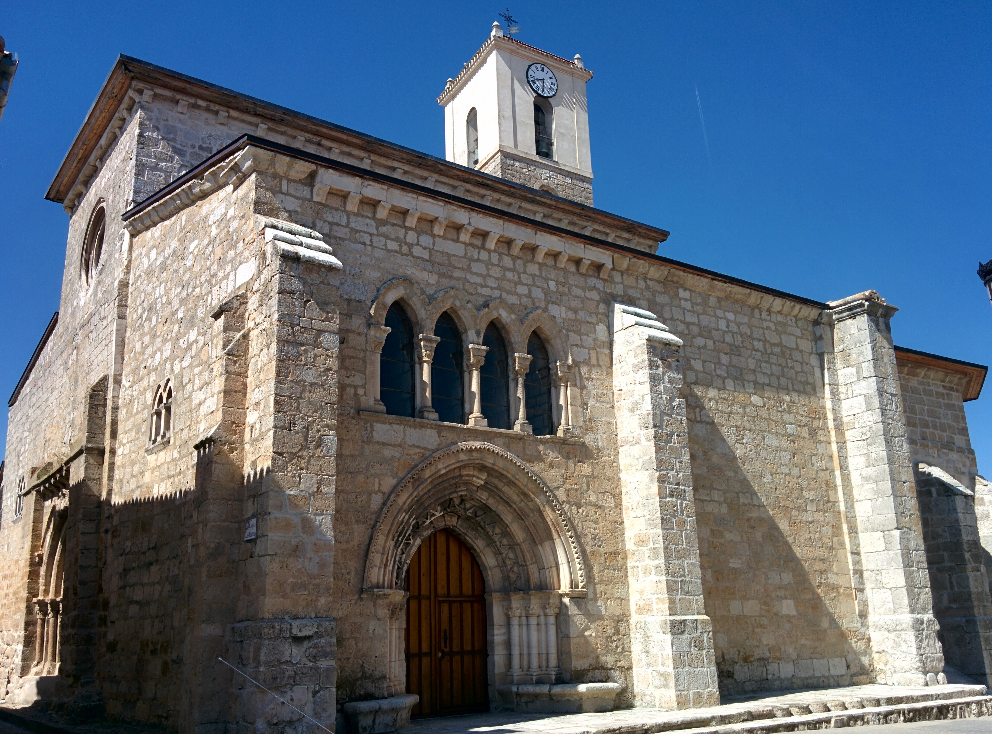 Iglesia de San Miguel, en Vertavillo (Palencia, España).